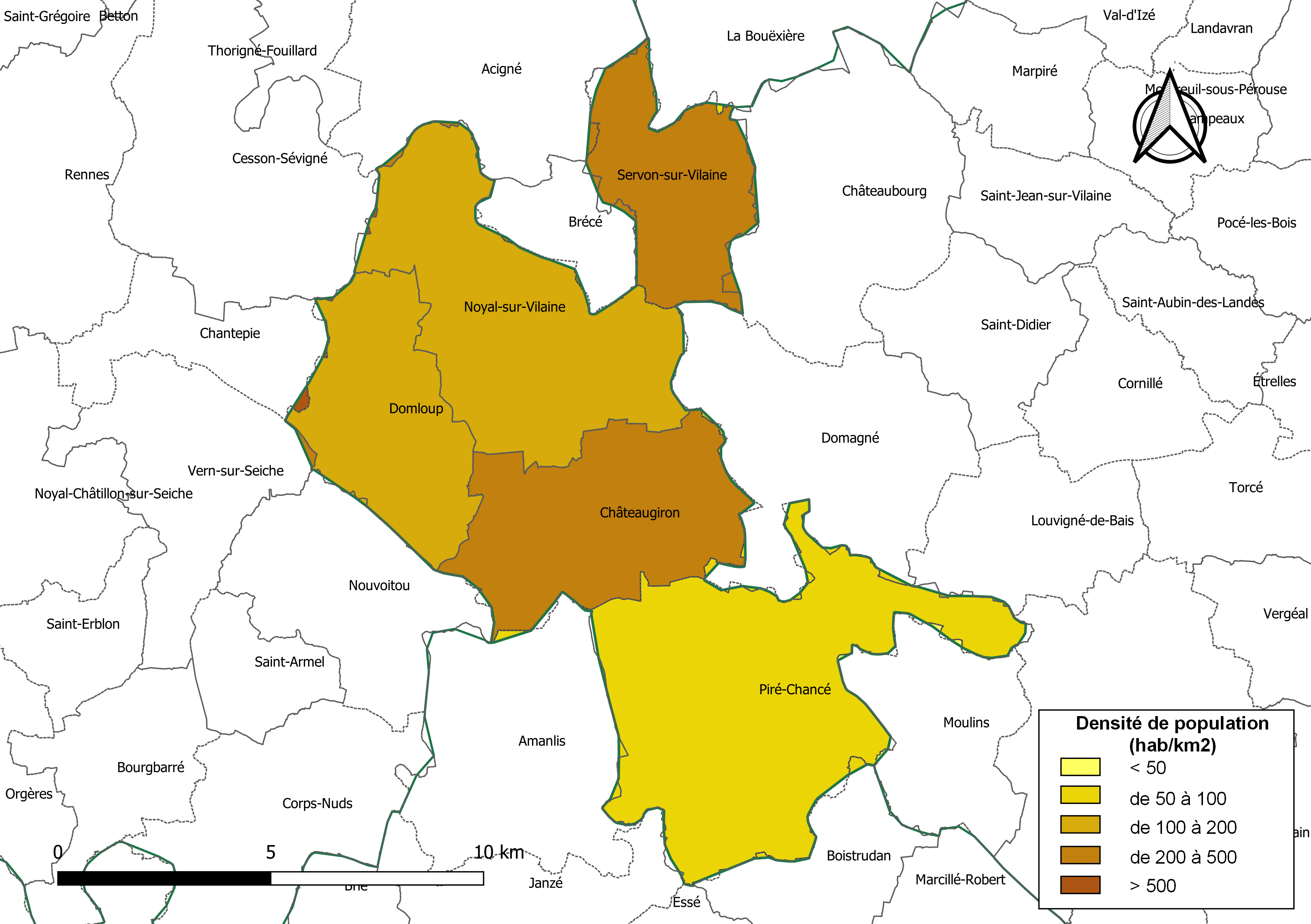 Carte des densités de population (millésimée 2016) des communes de l'intercommunalité Pays de Châteaugiron Communauté, département d'Ille-et-Vilaine, France. Composition au 1er janvier 2019.